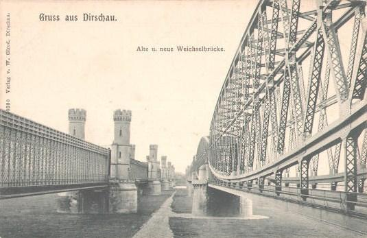 Tczewskie mosty.